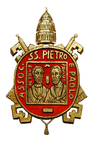 Stemma Associazione Ss. Pietro e Paolo